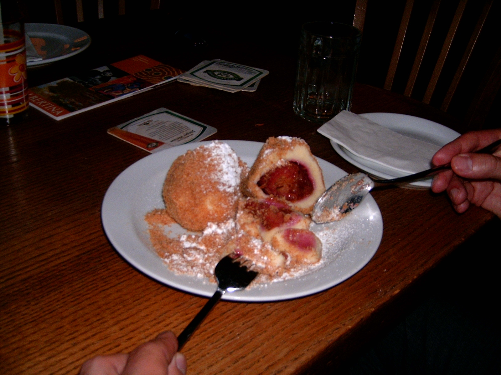 Zwetschgenknödel